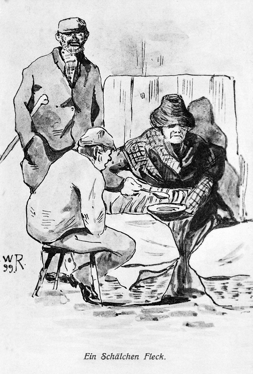 Eine Schale Fleck